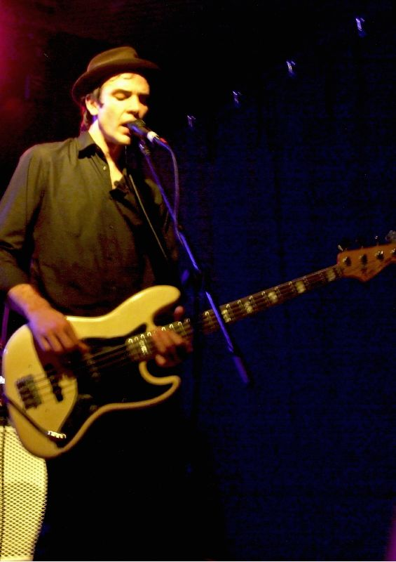 Alonza Bevan of Kula Shaker